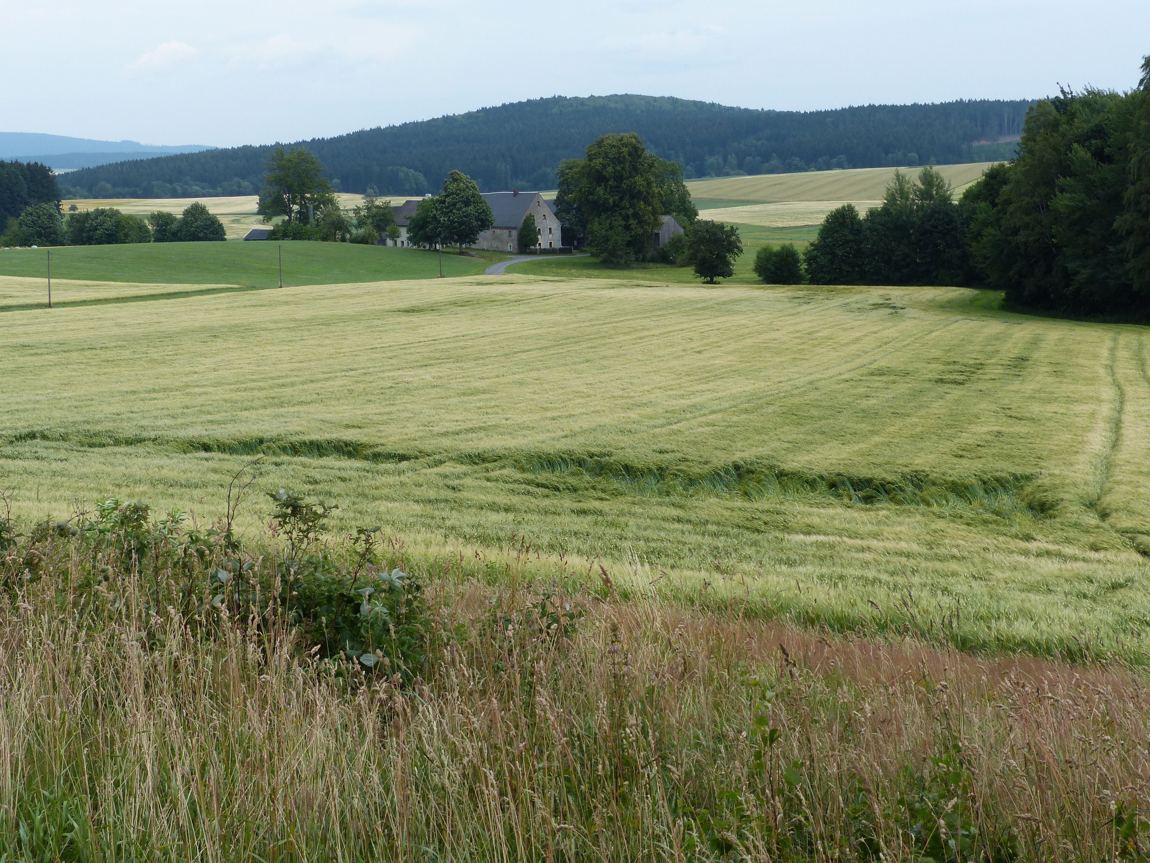 Ortsteil Grubbach, Stadt Weißenstadt